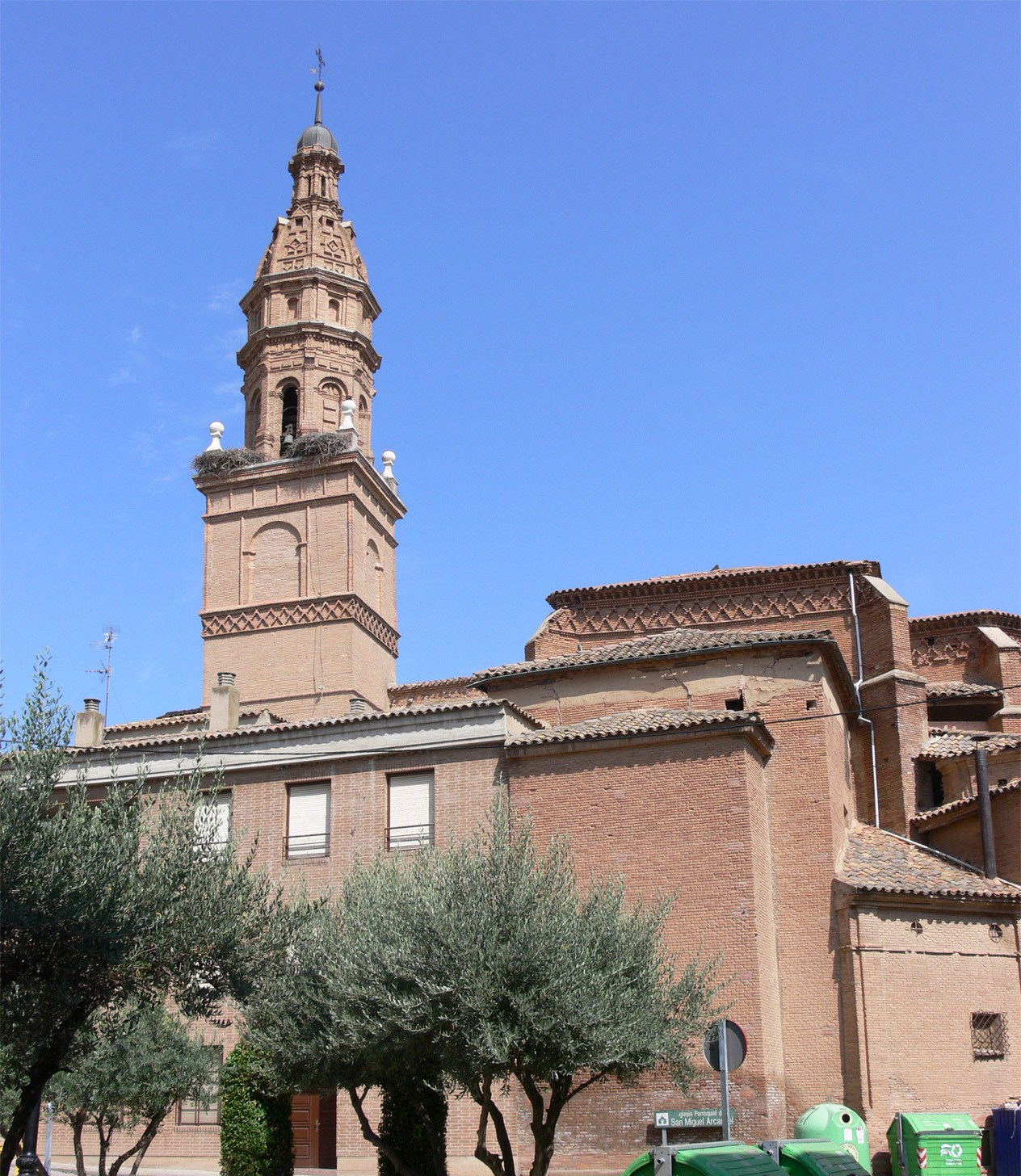 Iglesia de San Miguel Arcángel en Rincón de Soto (La Rioja, España)